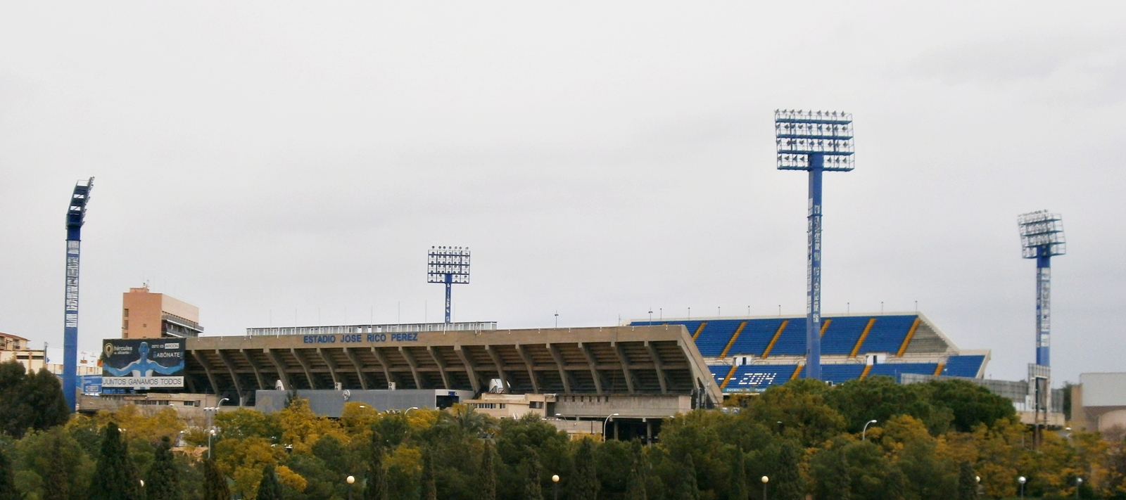 Vista del estadio de fútbol José Rico Pérez, Alicante, España.